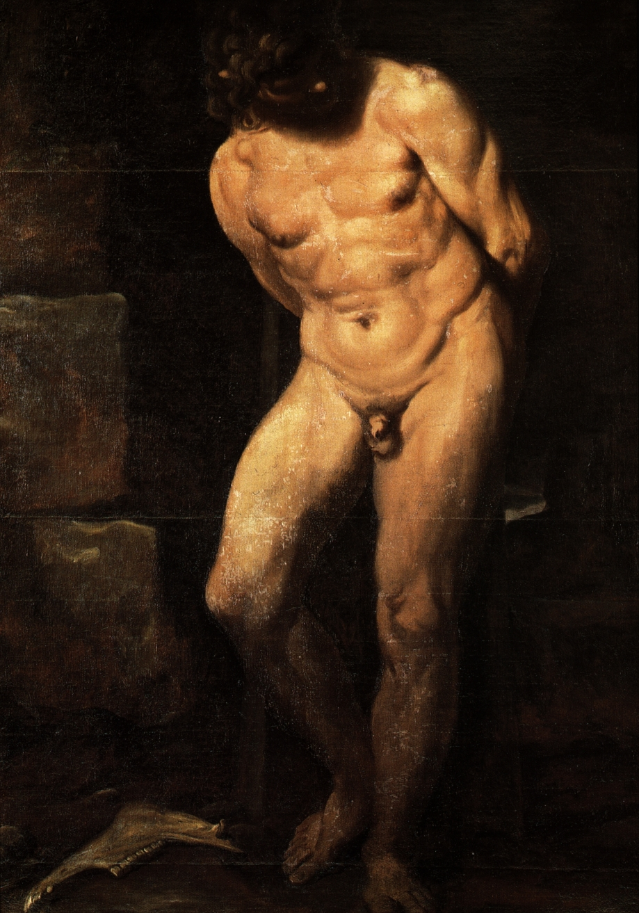 Samson imprisoned